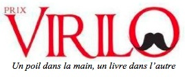 Logo du Prix Virilo